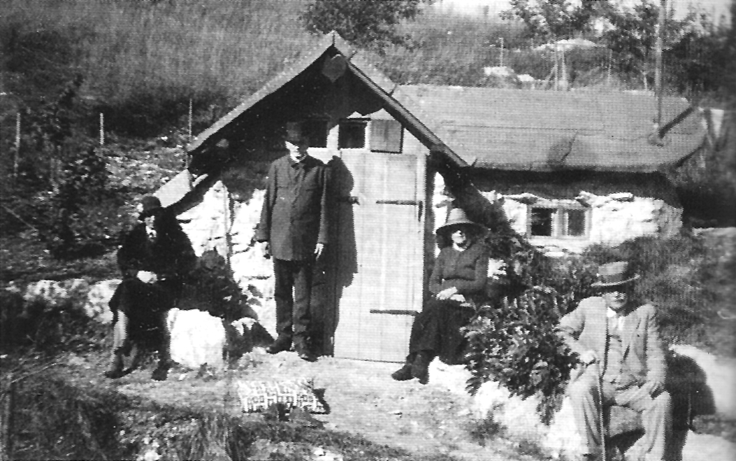 Wolfgang Stocks Großeltern (Carl Adolf und Luise Stock) und Eltern (Wolfgang und Marthe Stock) vor seinem Häuschen in Ofenhausen